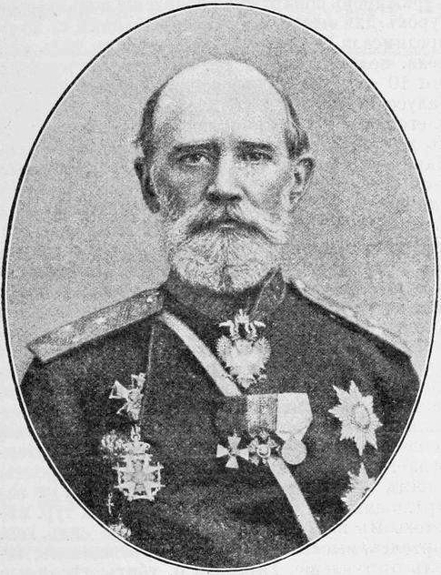 Генерал от артиллерии РИА Аксель Вильгельмович Гадолин. Данное фото было использовано в статье «Гадолин, Аксель Вильгельмович» опубликованной в седьмом томе «Военной энциклопедии», который был издан книгоиздательским товариществом И. Д. Сытина в 1912 году в столице Российской империи городе Санкт-Петербурге.